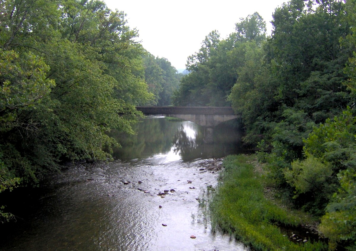 Little River in Walland, Tennessee.